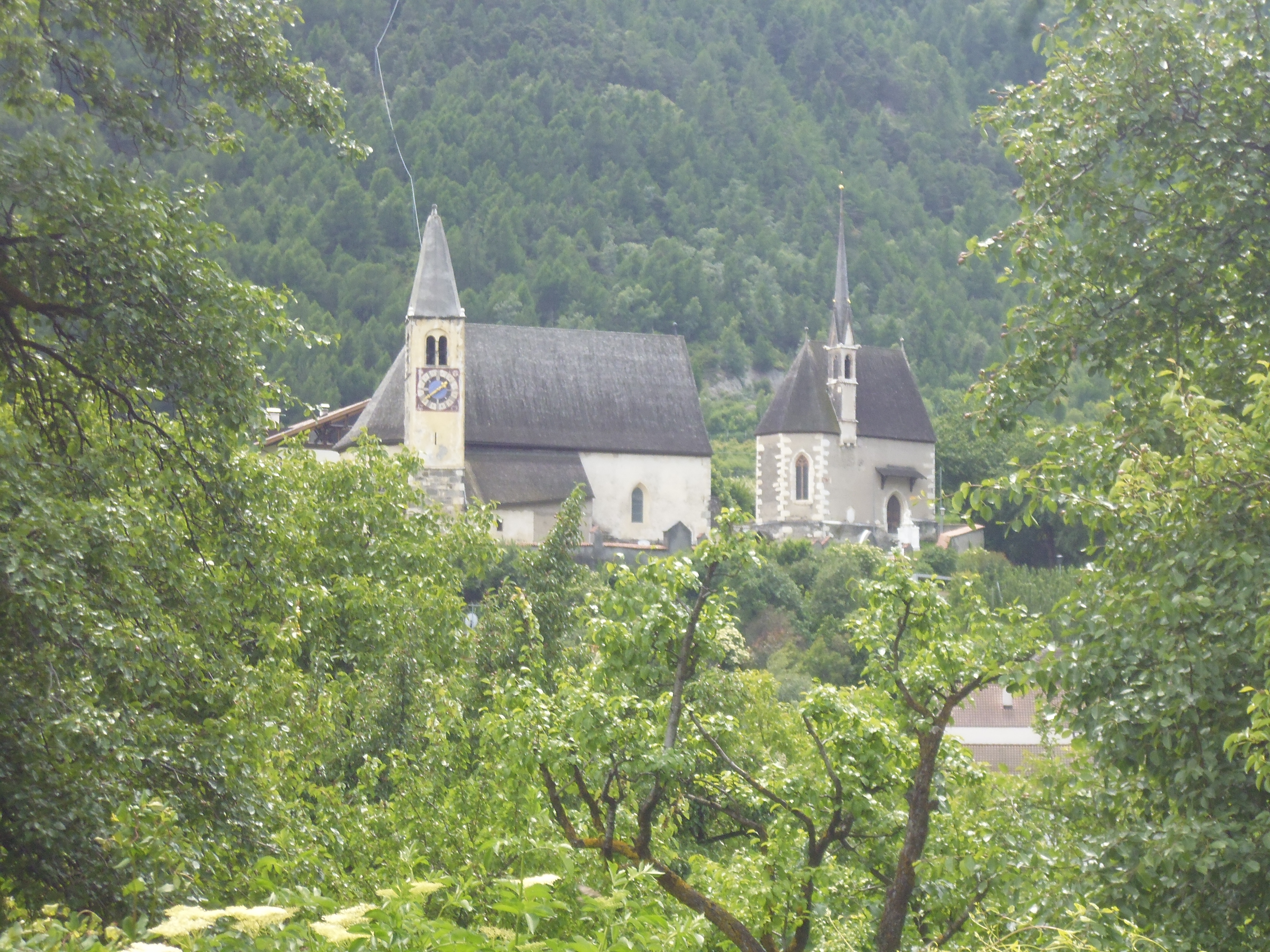 Pfarrkirche St. Martin und Kapelle St. Walburg in Göflan (Foto aus dem Zug der Vinschgerbahn)